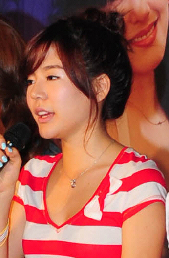 '소녀시대와 함께하는 쿠키 데이트’ Lg전자가 26일 저녁 ‘소녀시대의 쿠키(이하,‘소시의 쿠키’, 모델명: Lg-su920/Lg-ku9200)’의 구매 고객 100명을 초청, 삼성동의 한 갤러리 카페에서 ‘소녀시대와 함께하는 쿠키 데이트’ 행사를 열었다. 소녀시대 멤버들이 자신만의 쿠키를 만든 후 소개하고 있다.